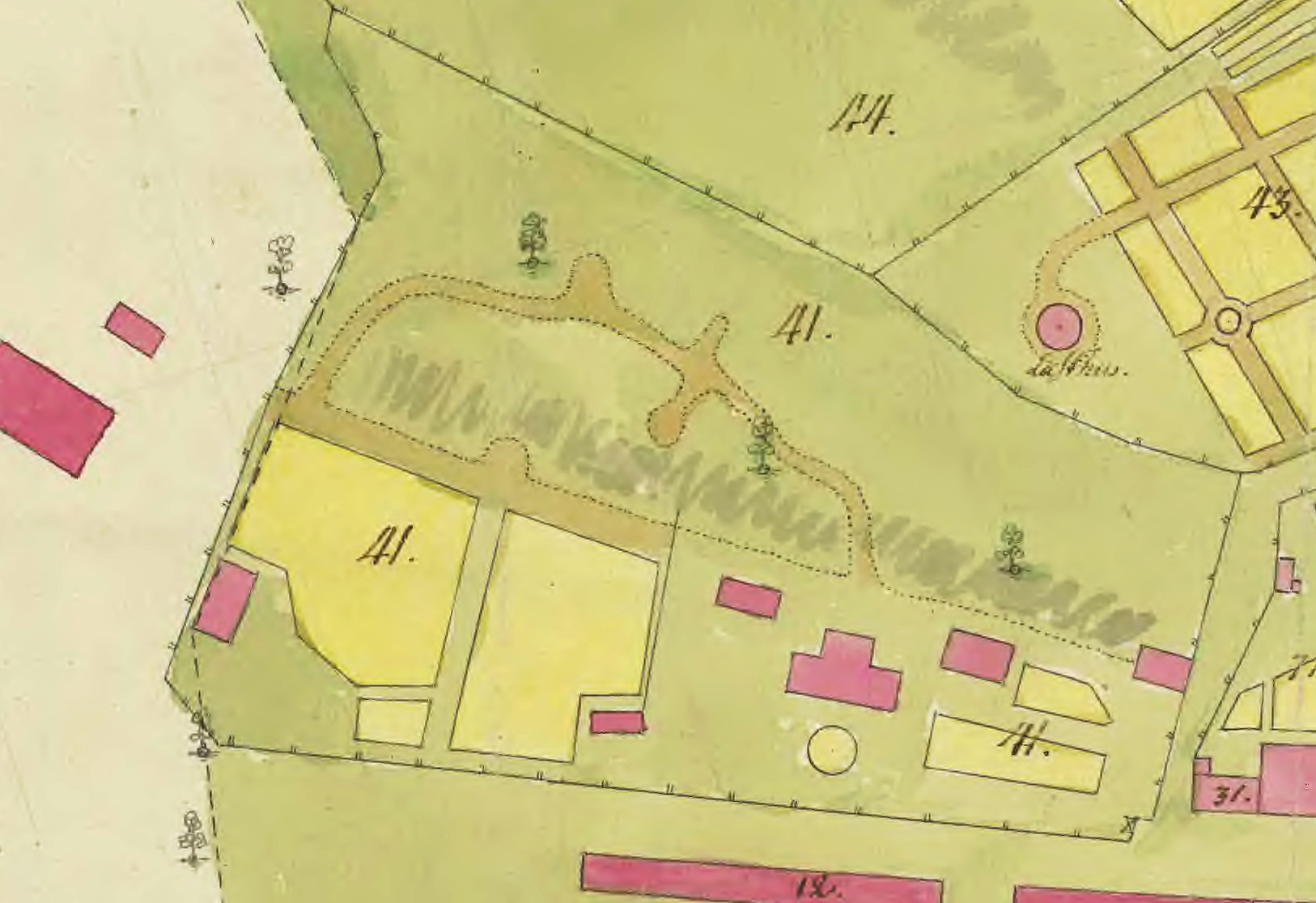 Medicinalrådet och Riddaren Hedins tomt på Drottningholmsmalmen